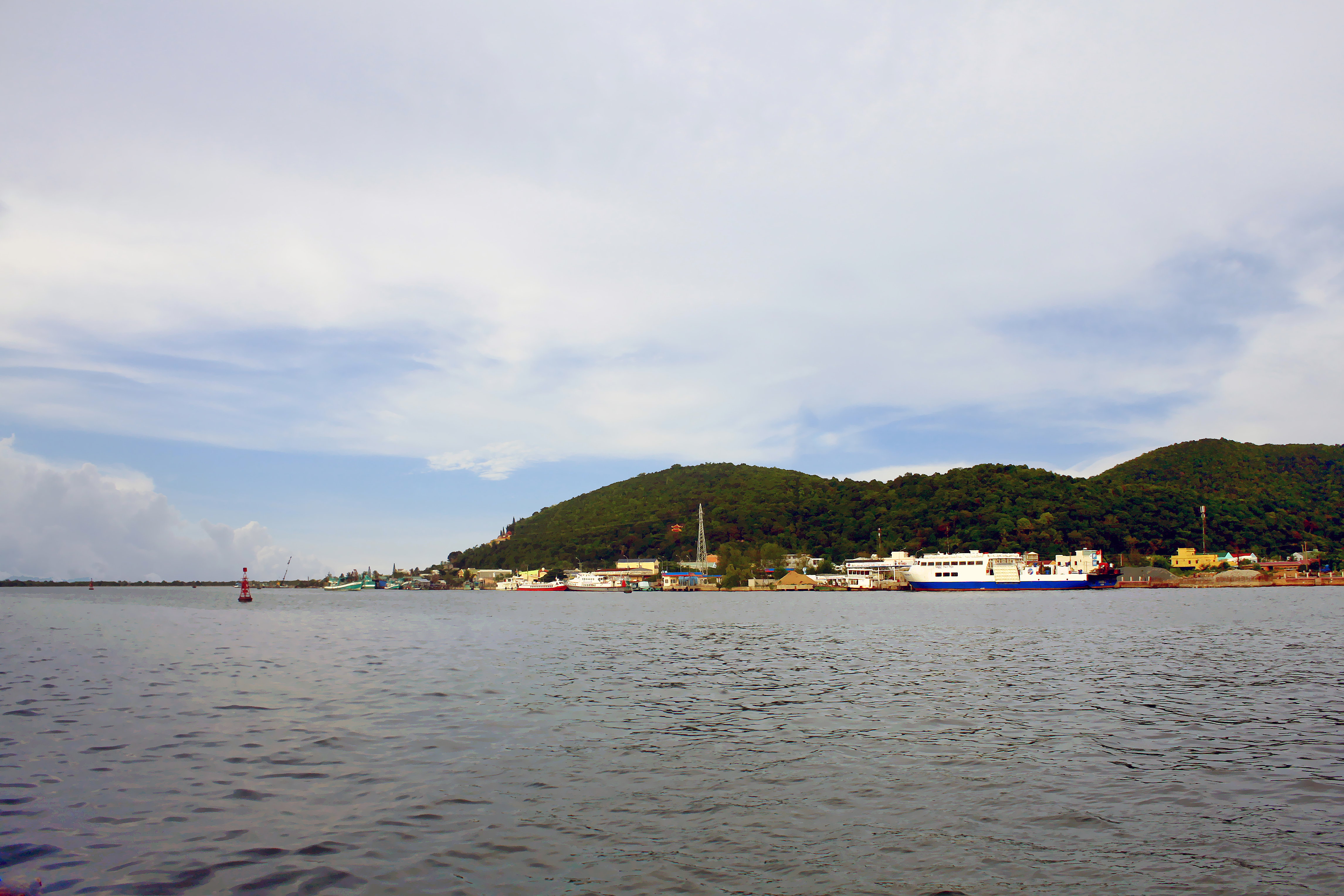 Núi Tô Châu nằm ở phía Tây vũng Đông Hồ; nay thuộc phường Tô Châu, thị xã Hà Tiên, Kiên Giang, Việt Nam. Tô Châu bao gồm hai ngọn là Đại Tô Châu và Tiểu Tô Châu. Ảnh chụp ở khu vực bến tàu khách Hà Tiên.